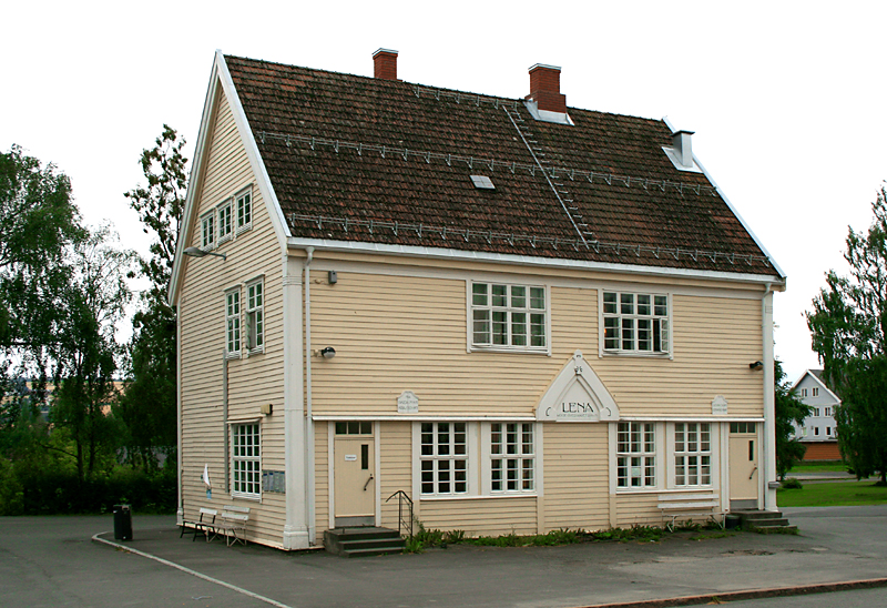 Lena stasjon, Skreiabanen. Bygd 1902. Arkitekt: Paul Due.